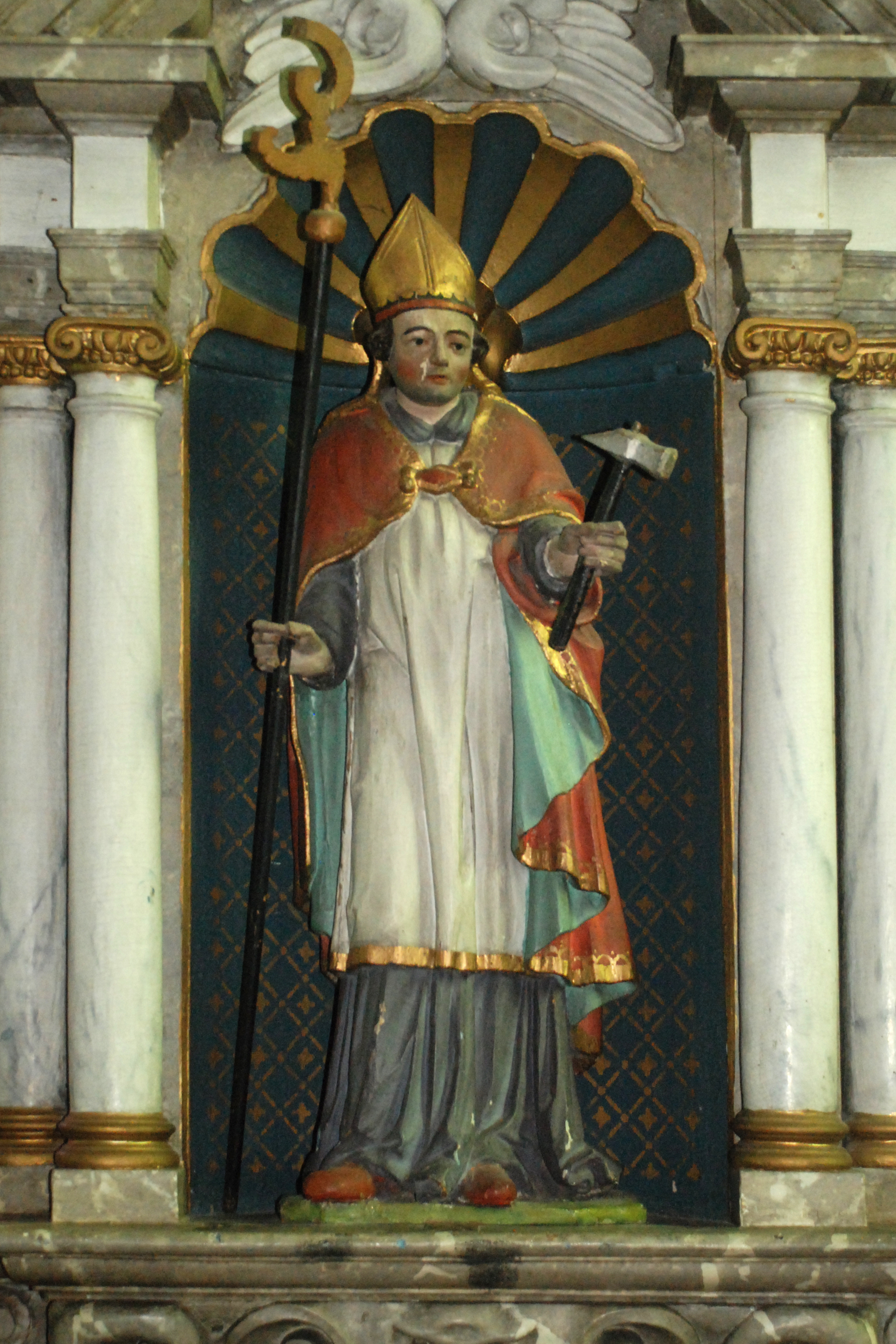 Belgique - Brabant wallon - Église de Court-Saint-Étienne